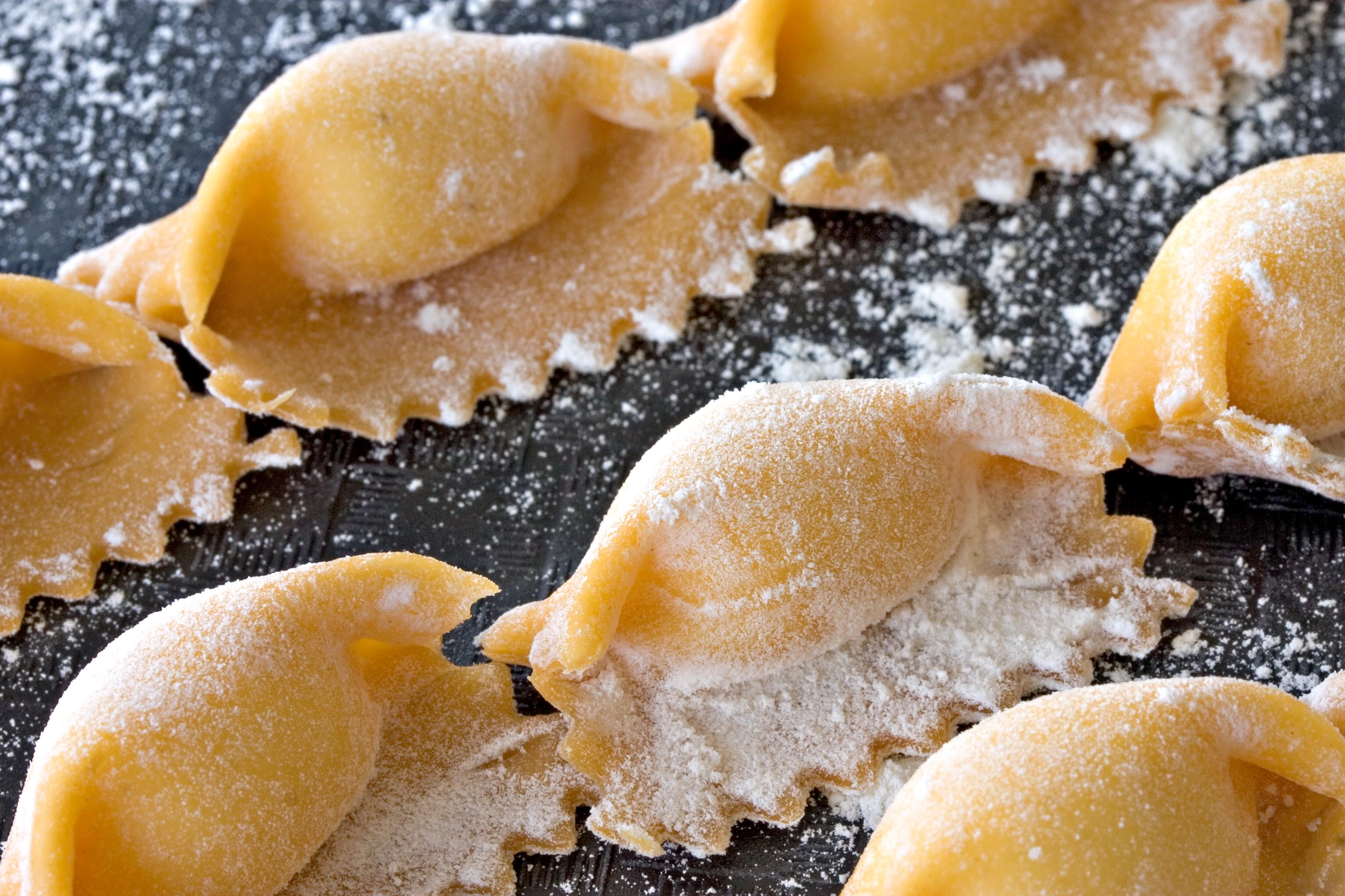 Potato Chip Agnolotti